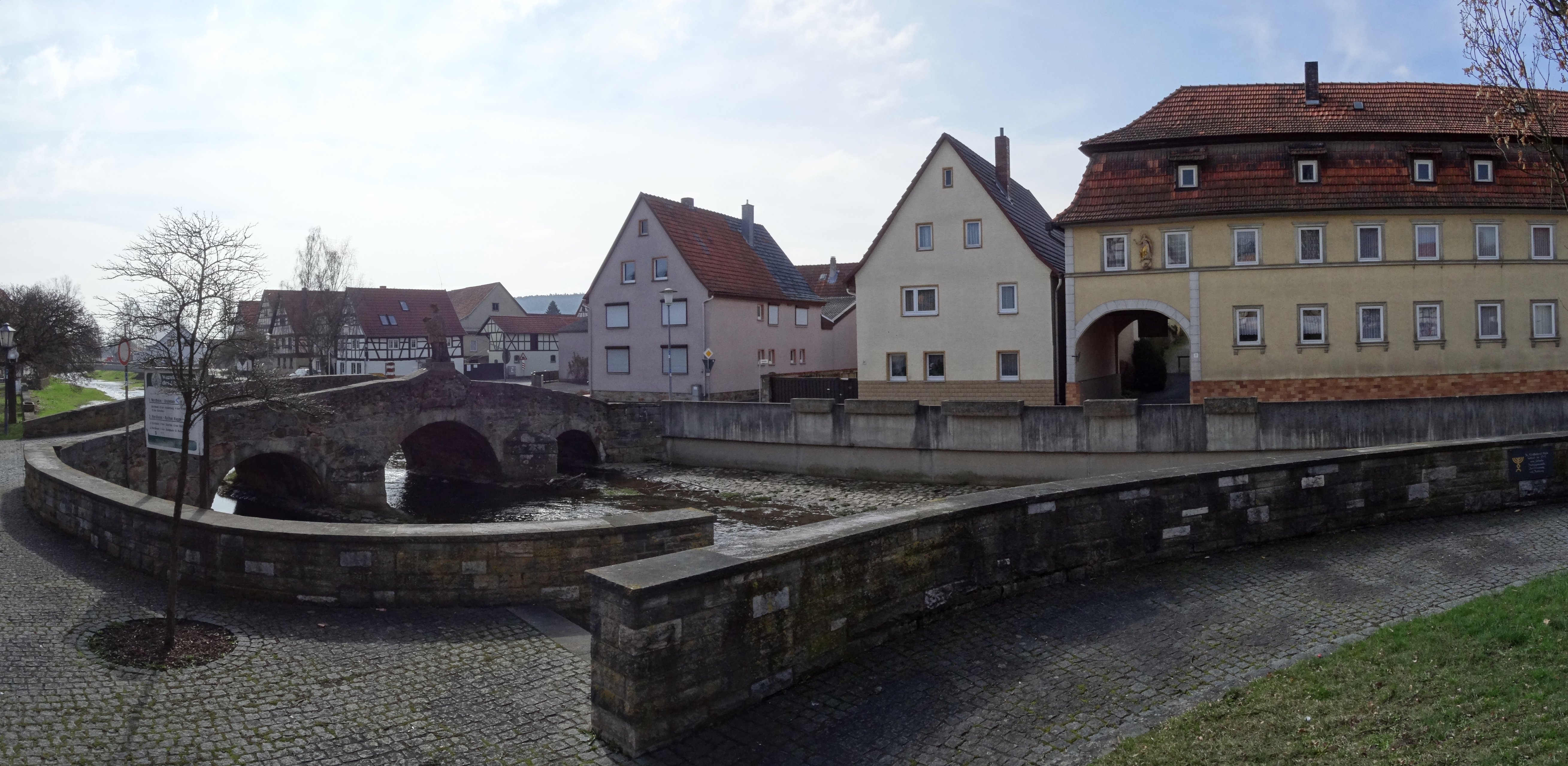 Streublick, Nordheim vor der Rhön